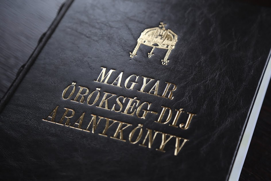 Magyar Örökség Díj Aranykönyv